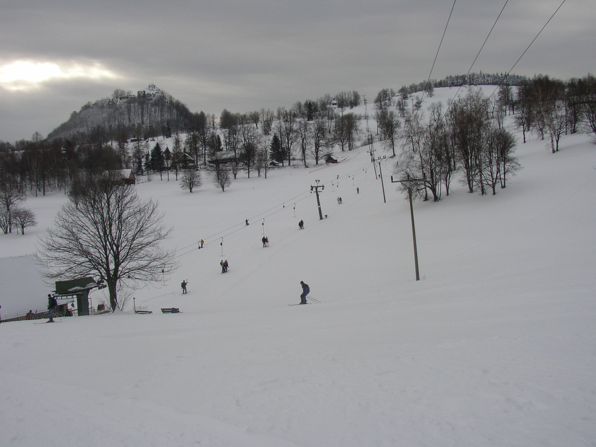 Sjezdovka na Mezičkách pod Tolštejnem, Jiřetín pod Jedlovou